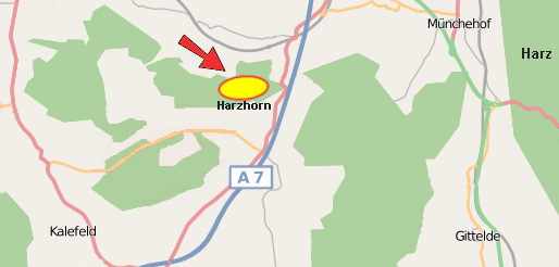 Lage des Römisches Schlachtfeldes bei Kalefeld nahe der Gemeinde Wiershausen im südlichen Niedersachsen